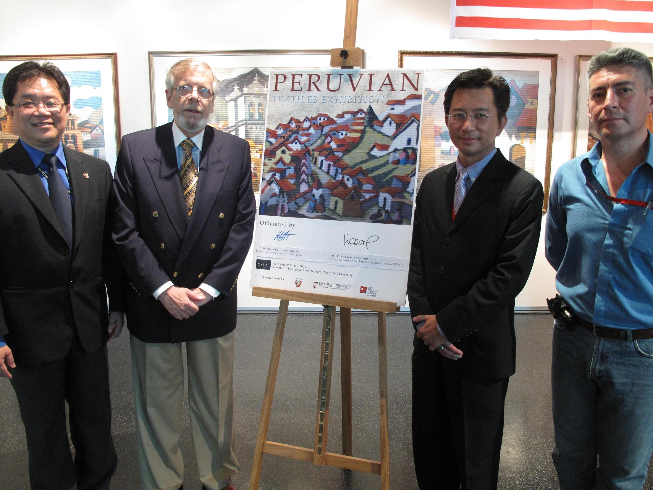 Como parte de su programa cultural, la Embajada del Perú en Malasia organizó con apoyo de la Universidad Taylor´s, una atractiva exposición de tapices de San Pedro de Cajas que los visitantes podrán visitar hasta el 3 de mayo en la galería CODA de la casa de estudios.